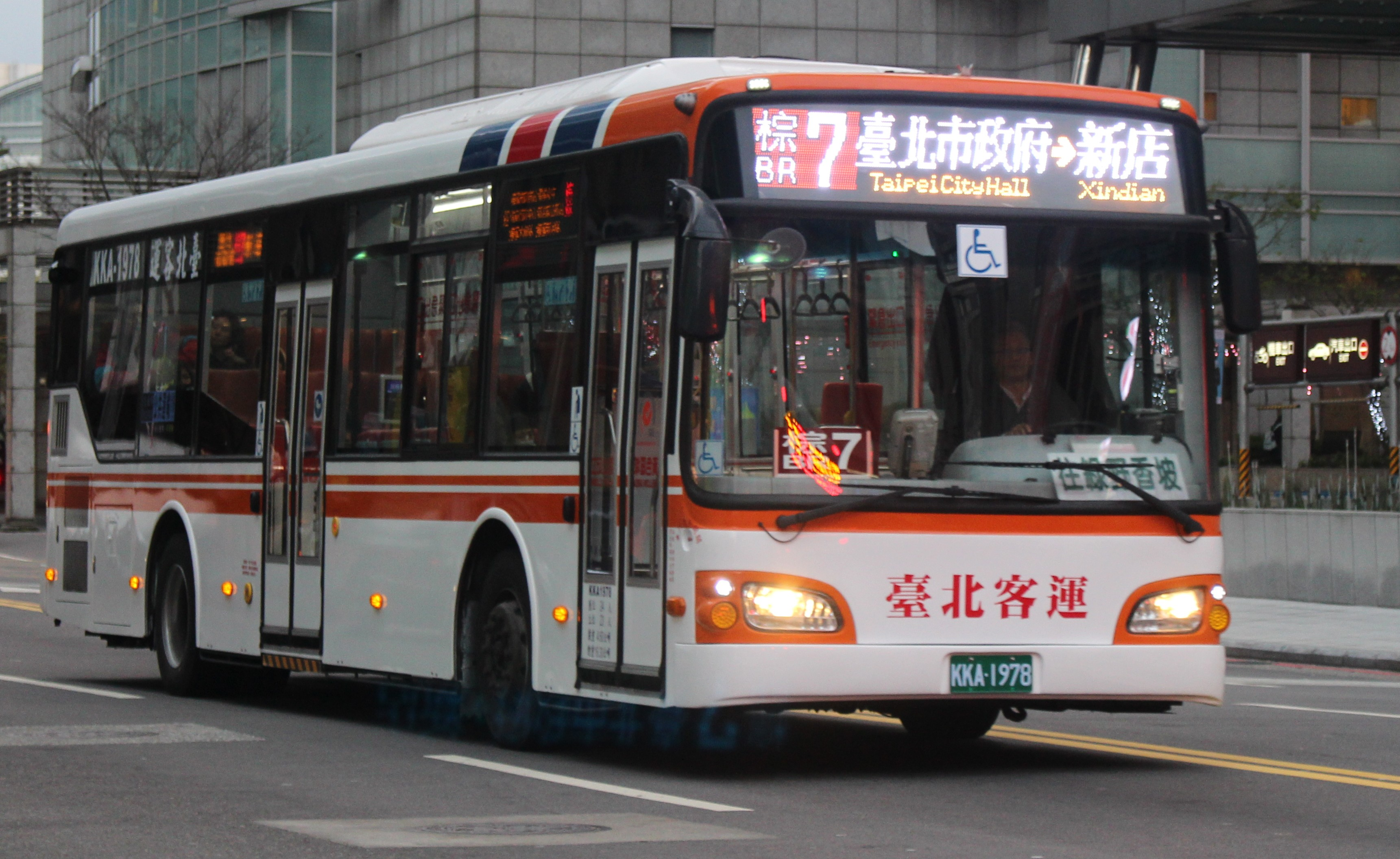 臺北客運首部弘鉅HINO低地板 KKA-1978